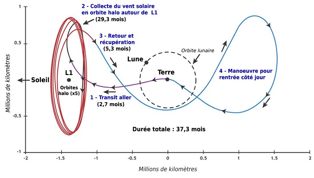 Trajectoire de la sonde spatiale Genesis de la NASA. Légendes en francais.